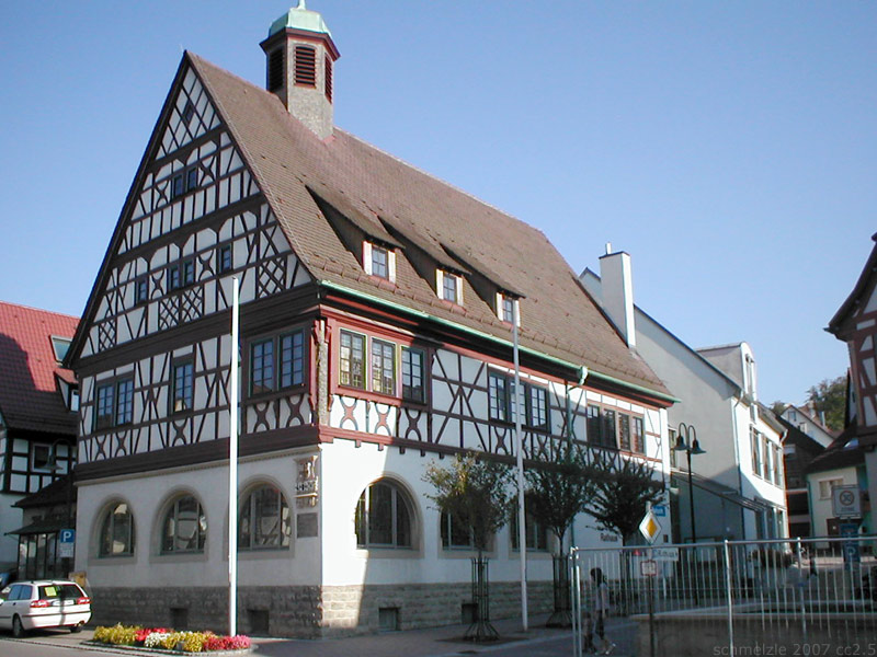 Rathaus in Oedheim, erbaut 1592/1600 als Amtshaus des Deutschen Ordens, 1954 nach Kriegszerstörung erneuert, Baden-Württemberg, Germany